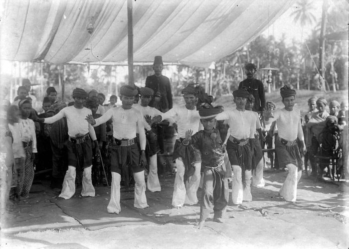 Negatief. Dansers te Samalanga